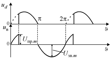 Файл запозичений з конспекту лекцій з курсу "Енергетична елетроніка" факультету електроніки НТУУ"КПІ".